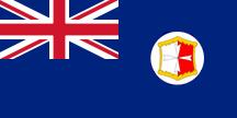 英屬馬爾他旗